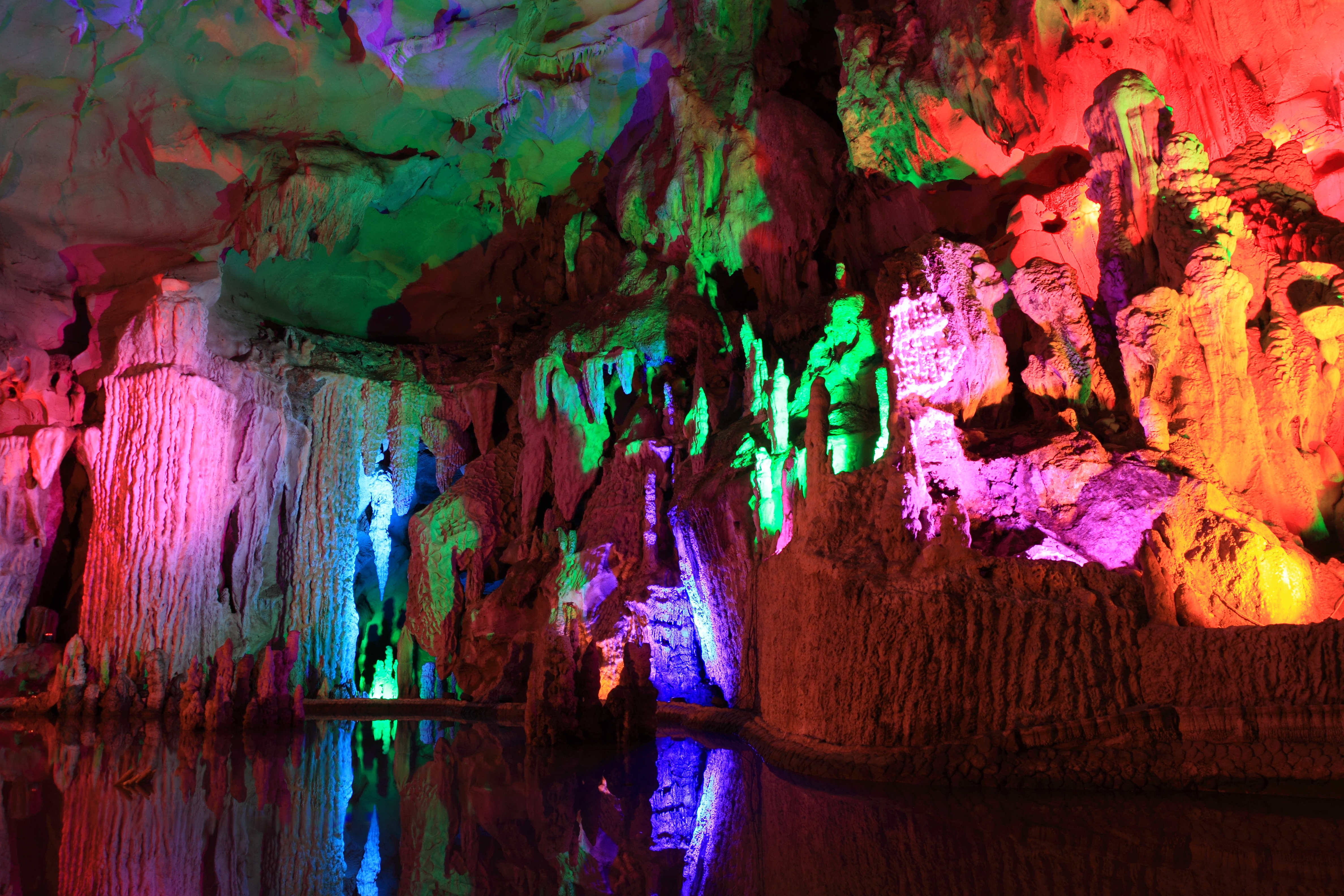 阳朔县聚龙潭